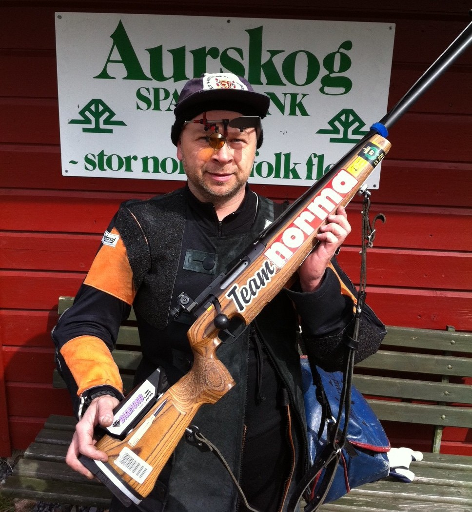 Knut Bråthen vant Urskogstevnet 2012 med 349 poeng.